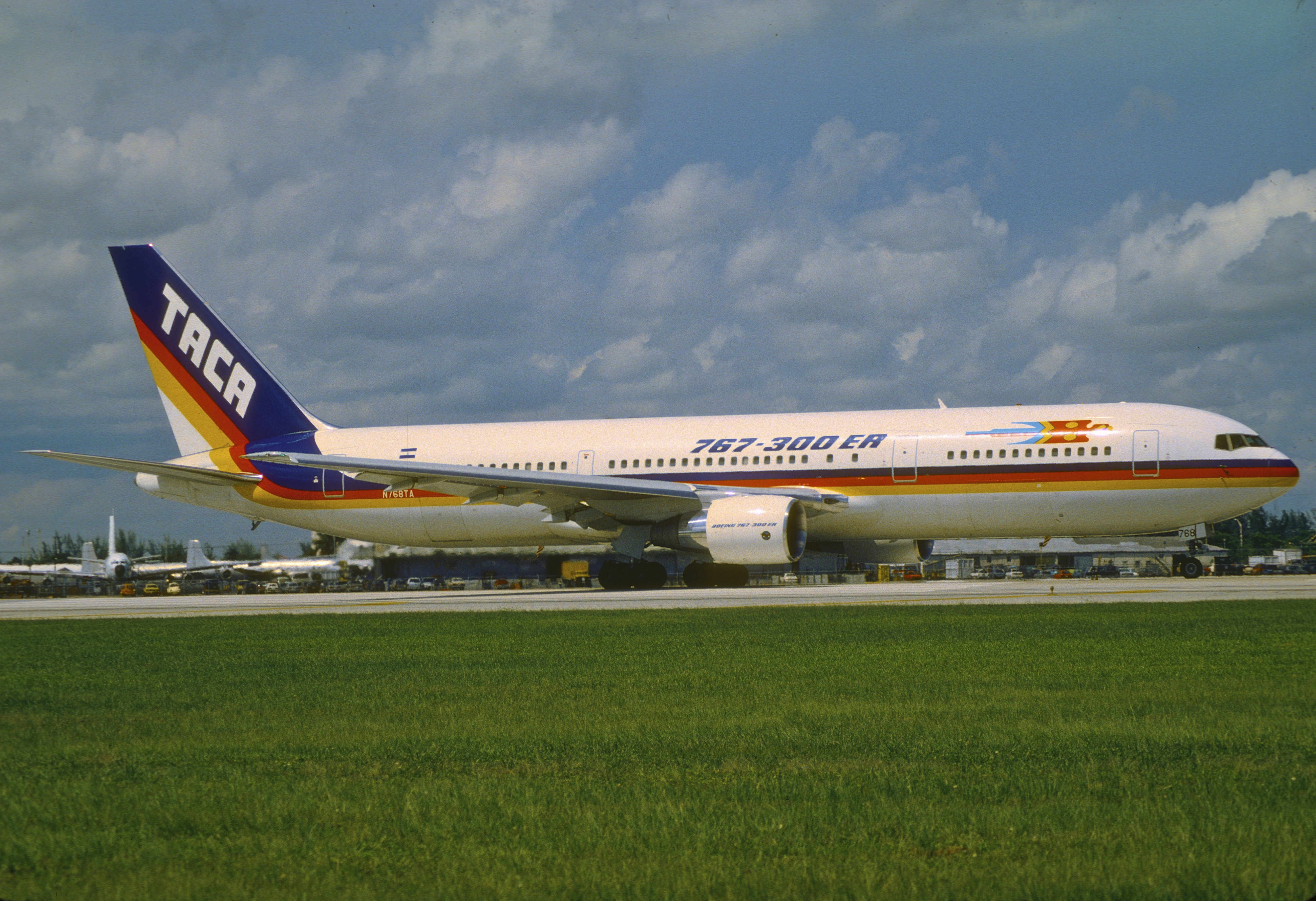 TACA Boeing 767-33AER; N768TA, August 1993